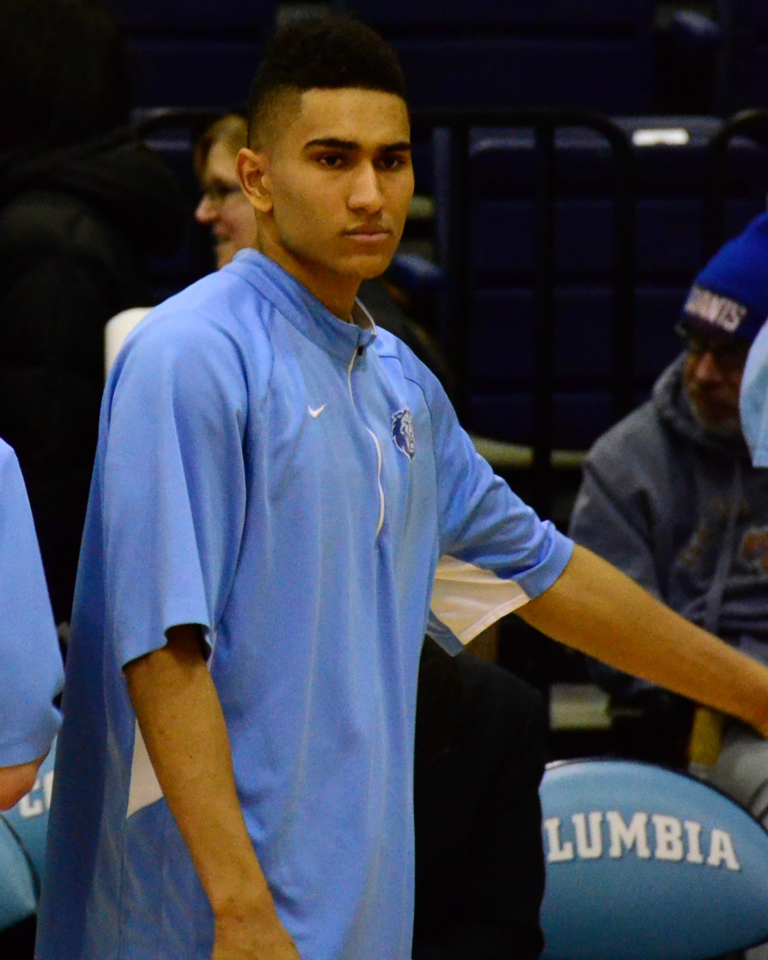 Maodo Lo